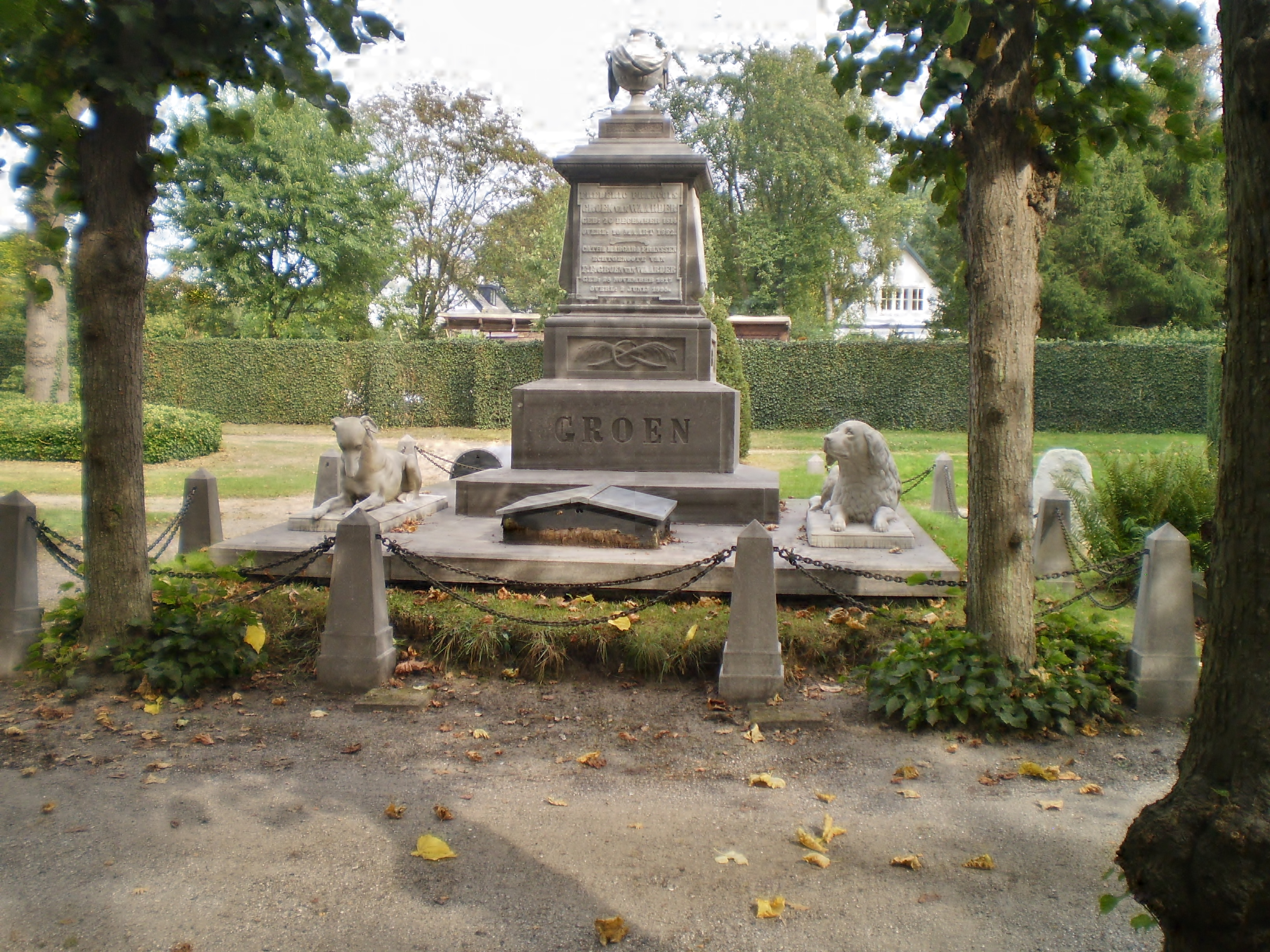 grafmonument Groen van Waarder